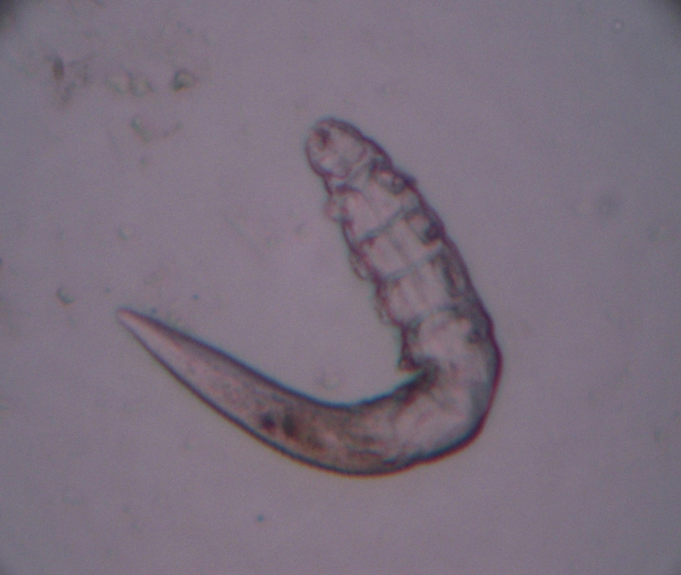 Vagellest koera (iiri setter) kõrvast